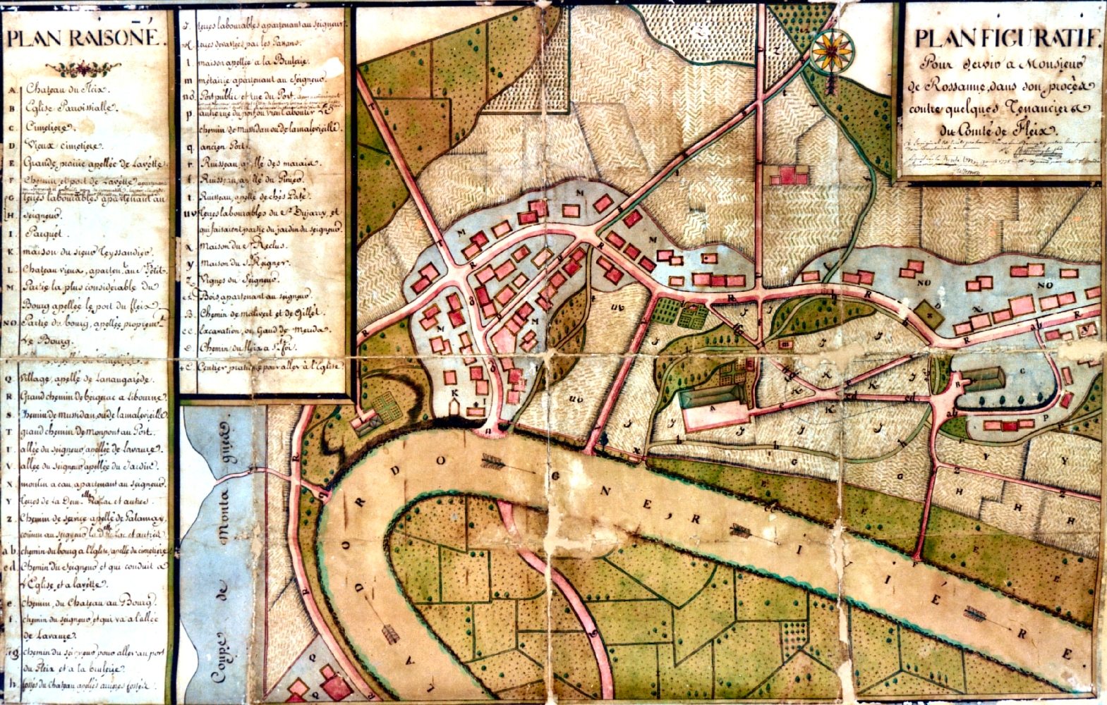 Photographie du plan du bourg du Fleix dressé pour le procès du seigneur Jean Louis de Rossane en 1778.